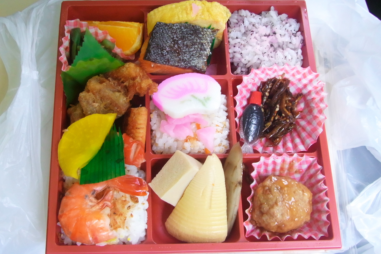 幕の内系の弁当ですが、いろんな具が入っています。一応、土佐のものっぽいです。高知駅にて。